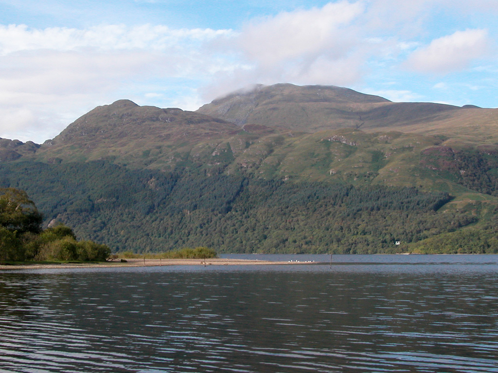 Blick vom Westufer des Loch Lomond auf den Ben Lomond (974 m); links der Seitengipfel Ptarmaggon